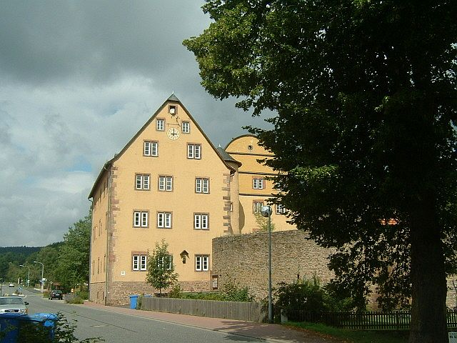 Wasserburg in Burgjoß (Spessart, Germany) von 1572. Der Ort ist Teilgemeinde von Jossgrund.